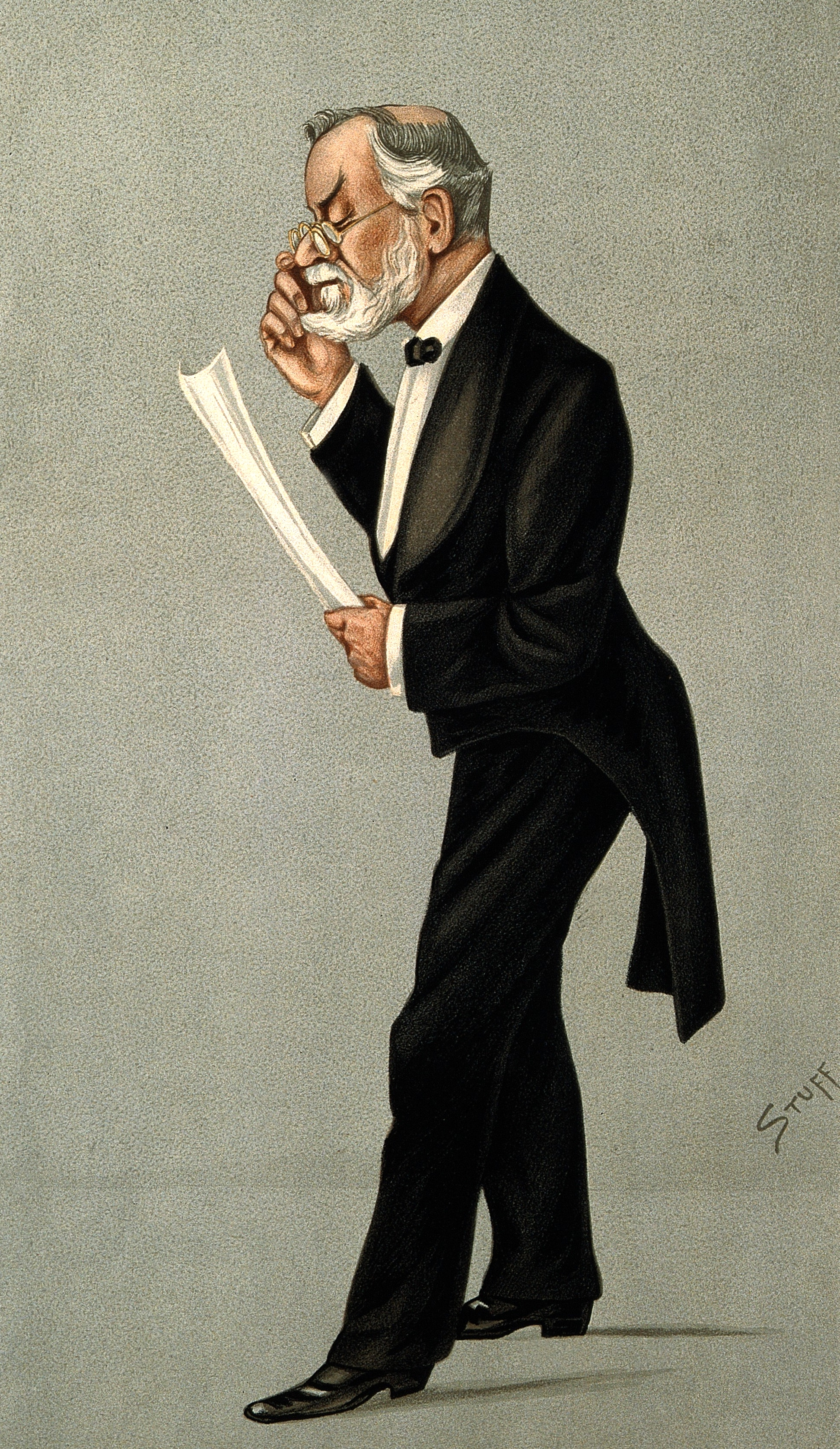 Genre/Technique: Portrait prints. Lithographs. Subject name: Carter, Robert Brudenell, 1828-1918.